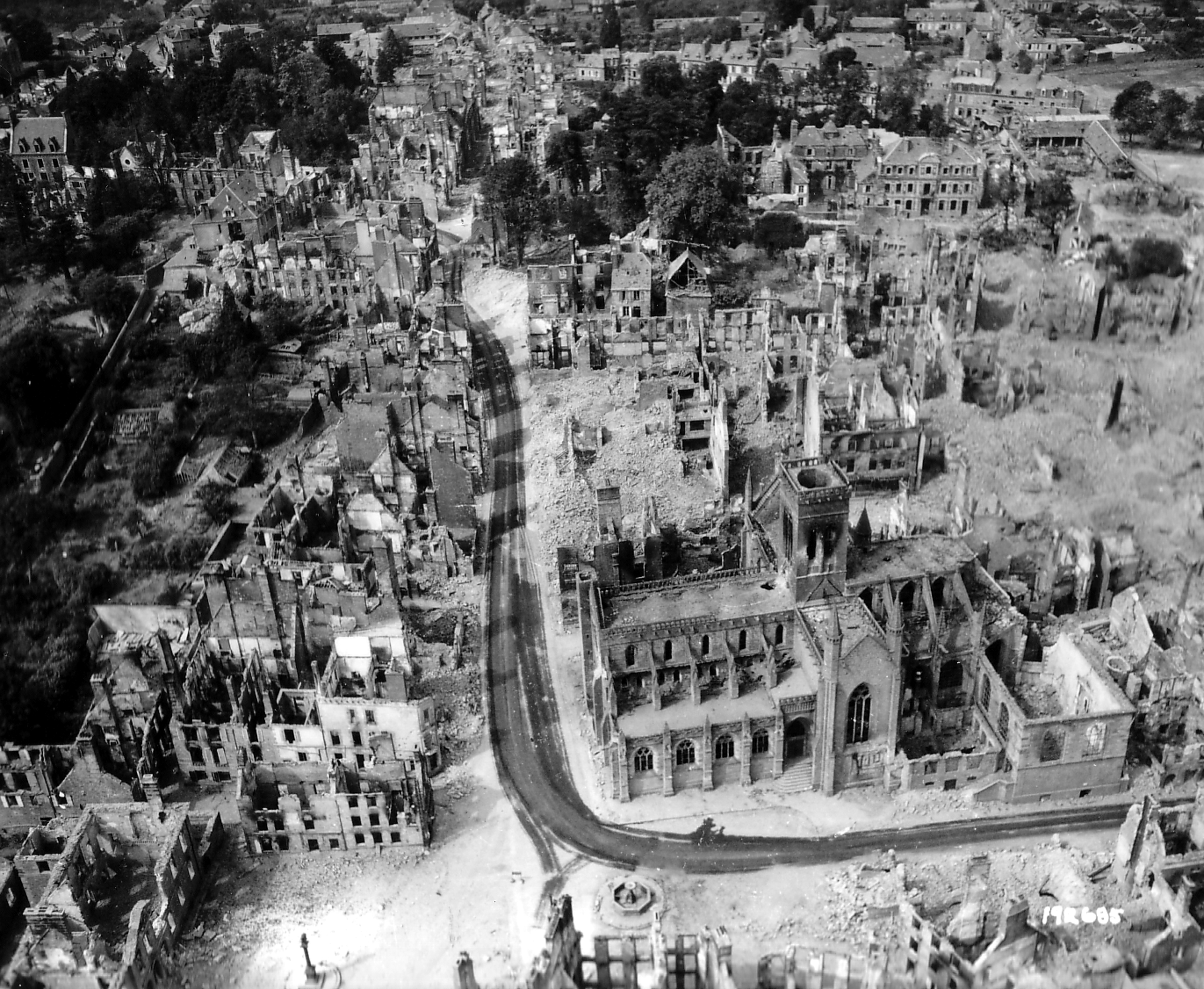 Vue aérienne de la ville de Vire après les bombardements du 6 juin, l'église Notre-Dame est le seul édifice debout au milieu des immeubles en ruines.